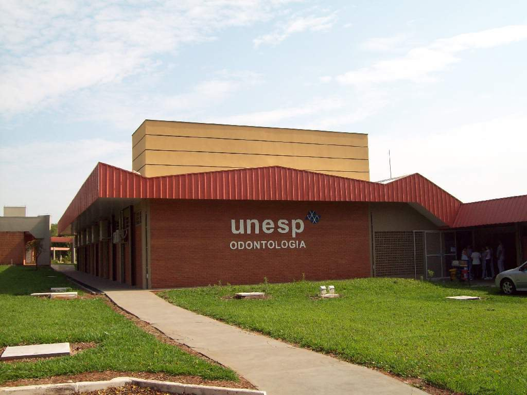 Campus da UNESP em Araçatuba São Paulo, Brasil.